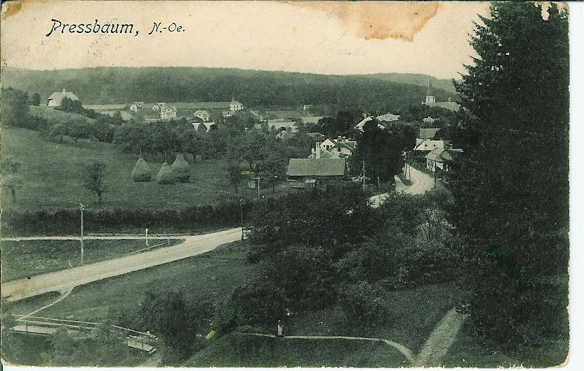 Pressbaum vom Talausgang der Pfalzau um 1900, Ansichtskarte